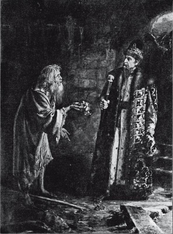 П. И. Геллер. Иоанн Грозный и юродивый Никола Салос